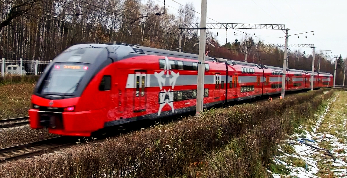 Электропоезд ЭШ2-024 на Киевском направлении МЖД